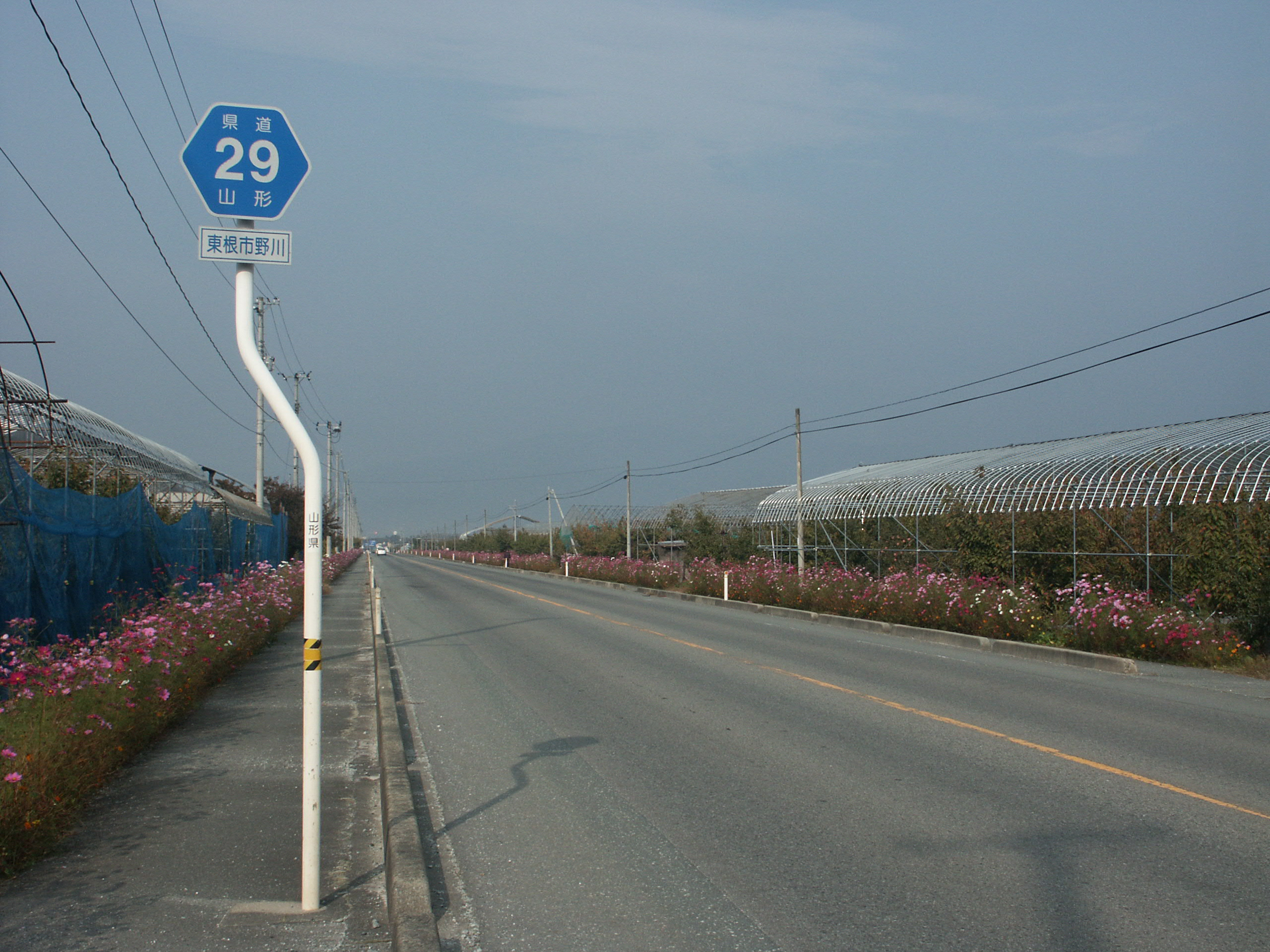 山形県道29号線東根市野川付近